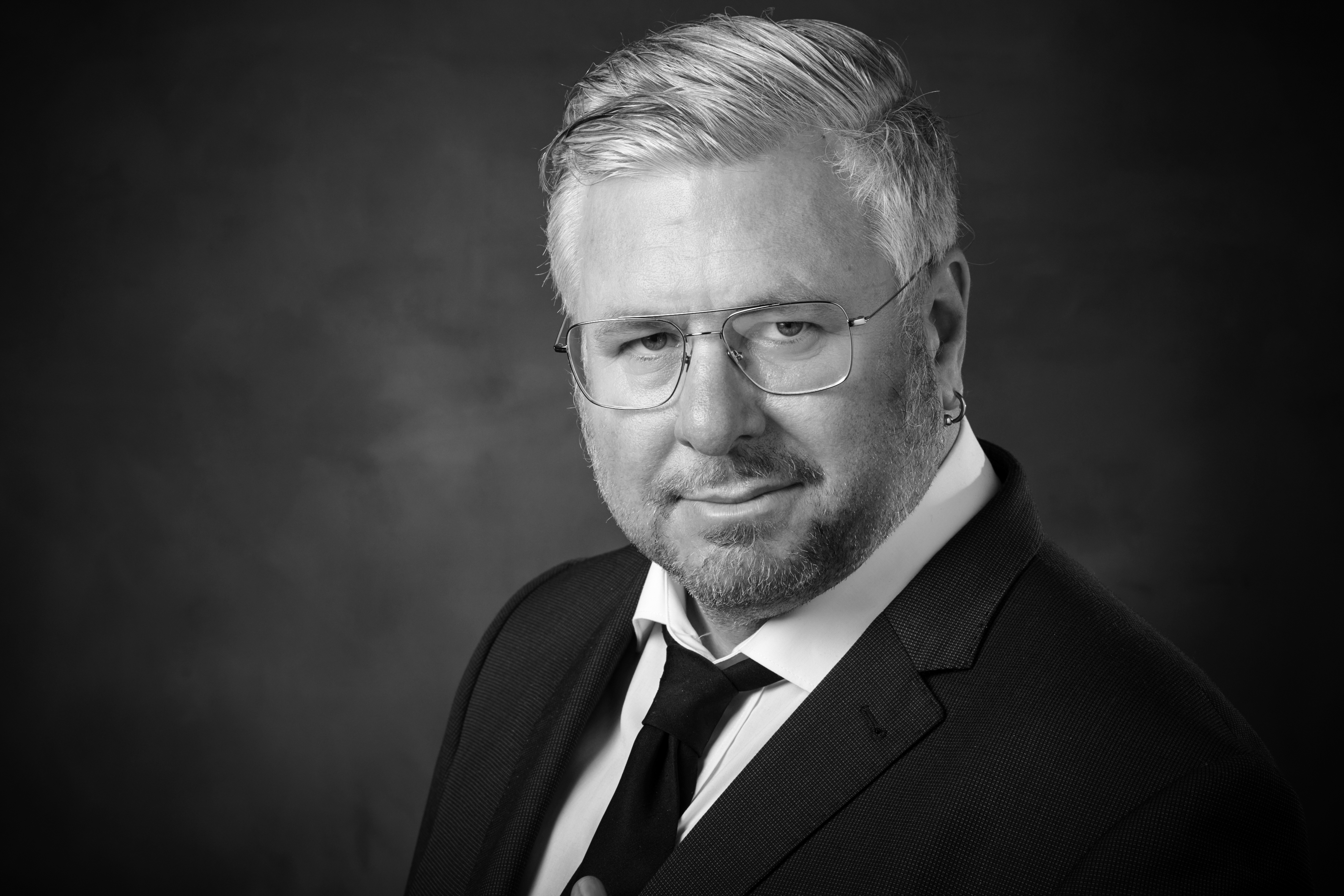 Foto: Carolin Tietz. Die Rechte liegen bei Moses Wolff